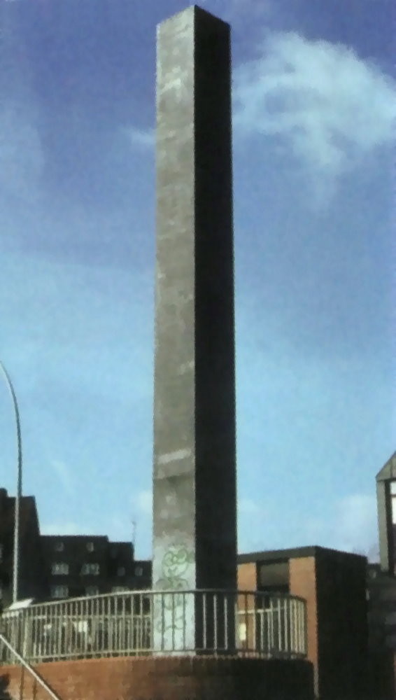 (abgesenktes) Mahnmal gegen Faschismus, Krieg, Gewalt, für Frieden und Menschenrechte, Esther und Jochen Gerz